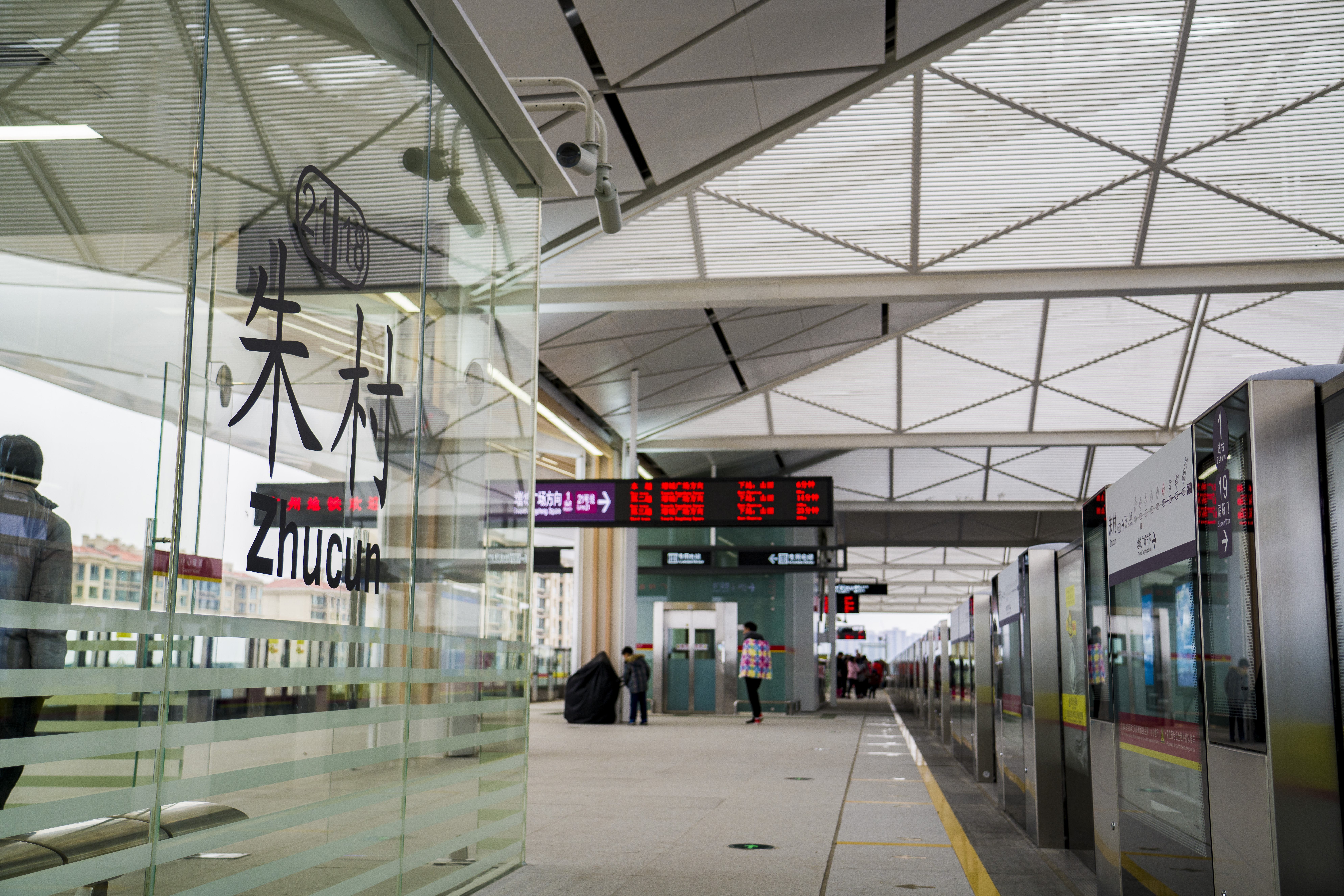 朱村站一号月台